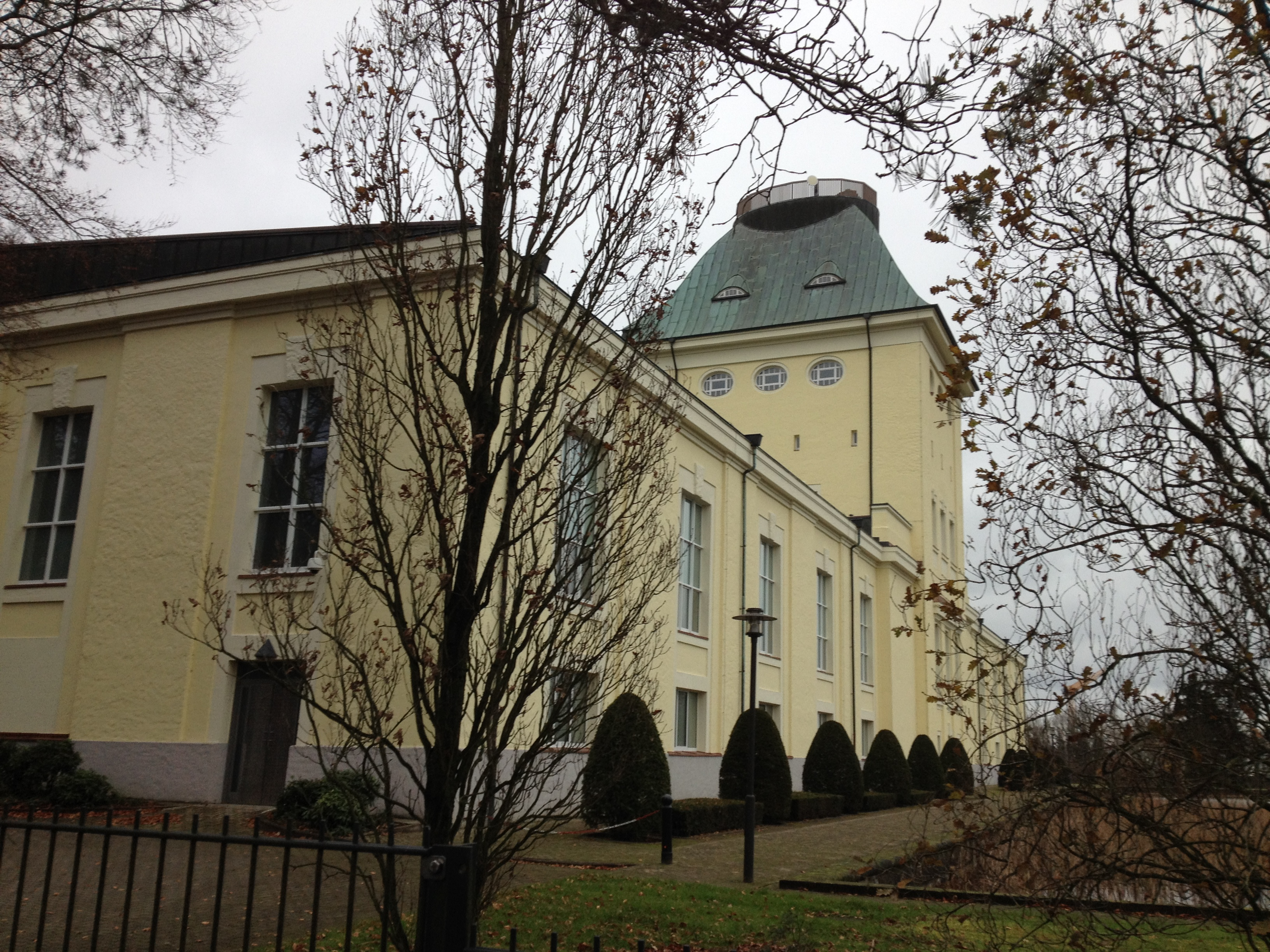 ("Gelbes Schloss" vom Wasserwerk Baursberg/Falkensteiner Ufer, karlderkahle)